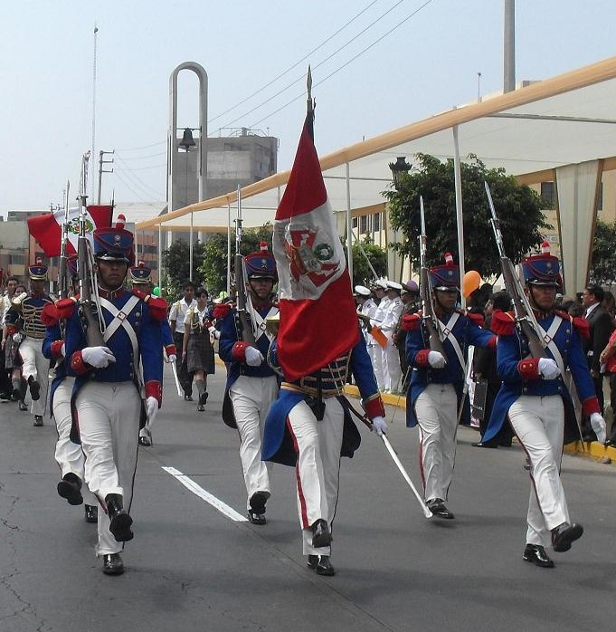 Bandera de Guerra de la Legión Peruana de la Guardia.